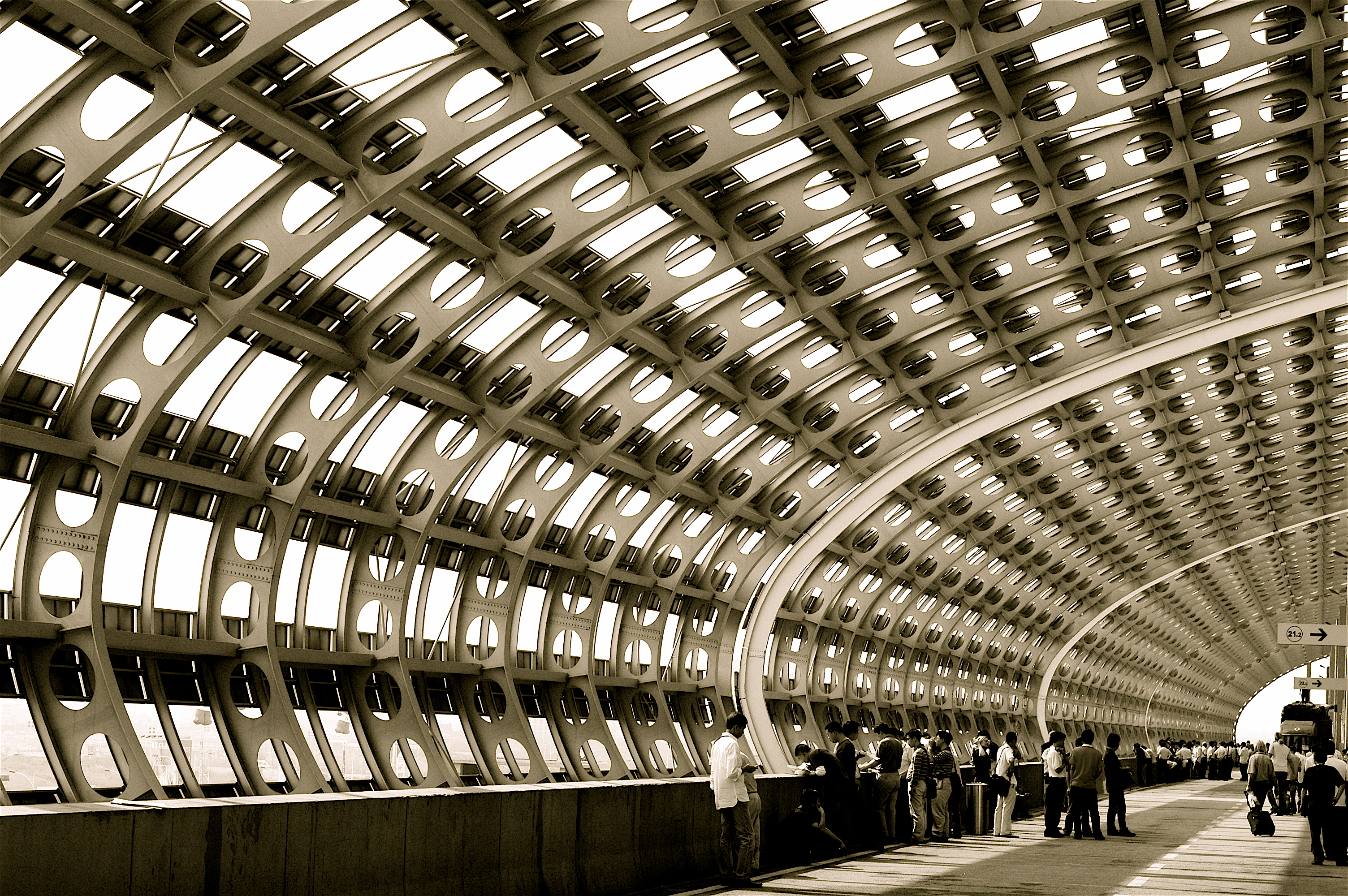 Canton Trade Fair